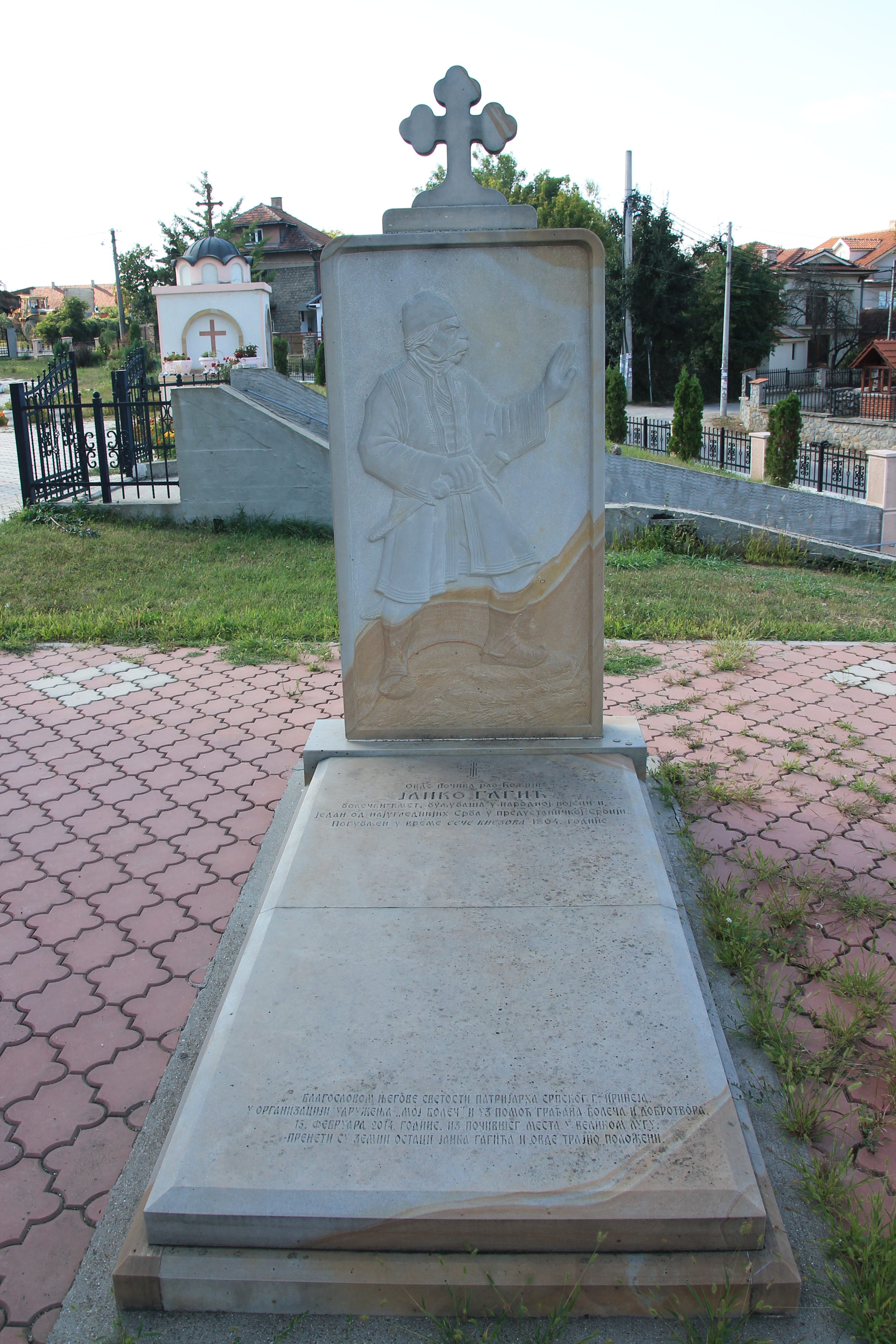 Crkva Vaznesenja Gospodnjeg (Boleč)